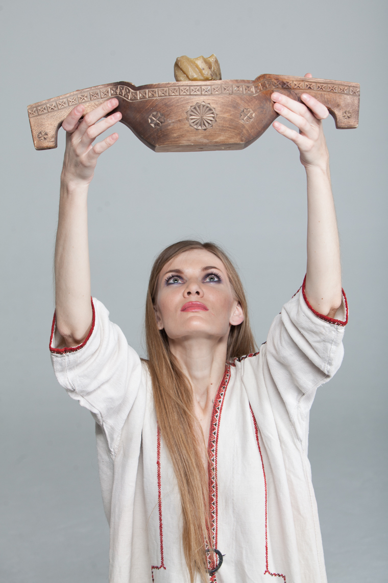 Штатол - родовая обрядовая восковая свеча. Ритуальный атрибут молений эрзя, мокша.Эрзянь: Штатол - те эрзянь озксонь кедь ёнкс.